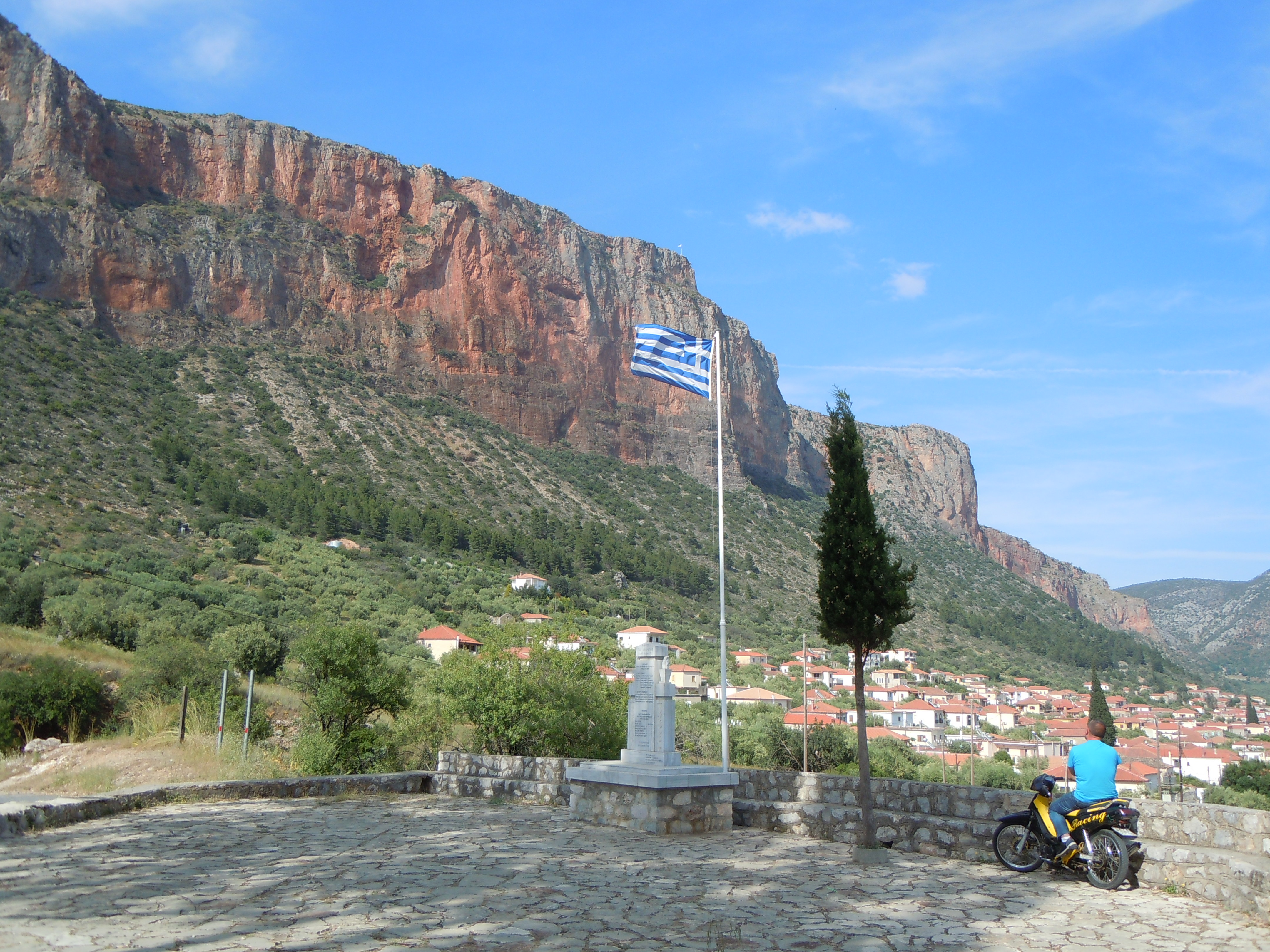 Falaises de Kokkinovrachos depuis Agios Nektarios, Leonídio, Grèce